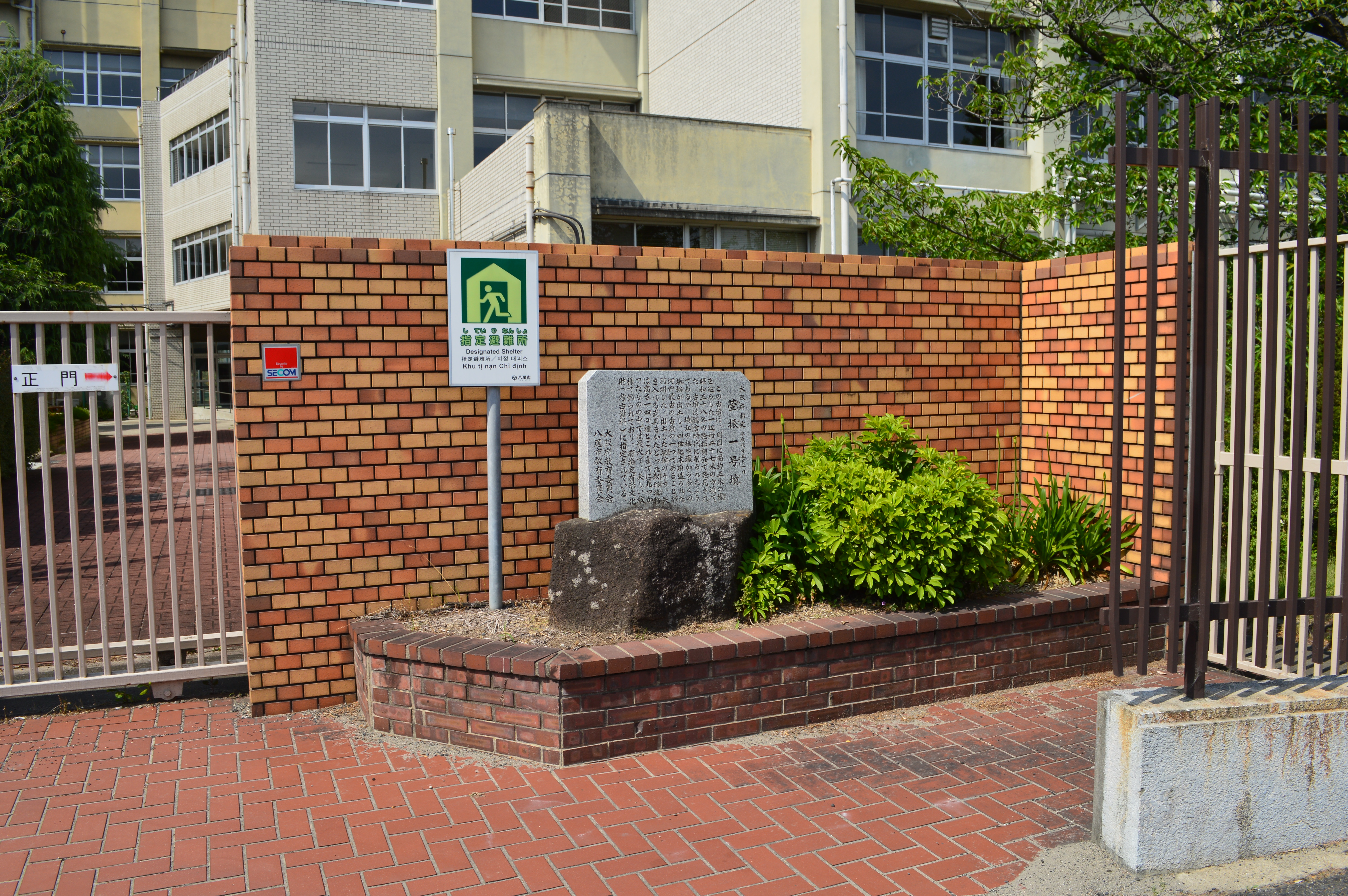 萱振1号墳跡 説明板付近